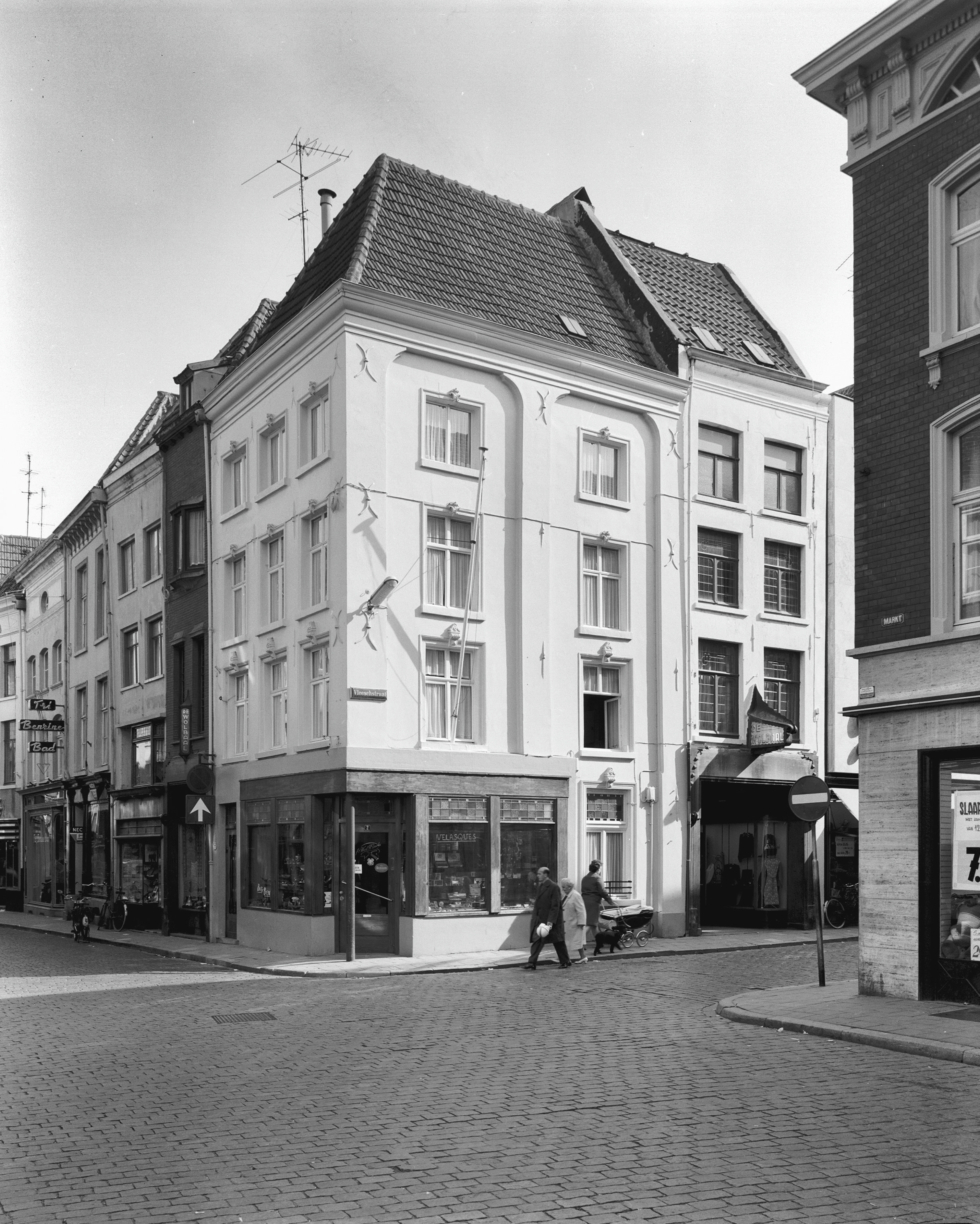 hoek Vleesstraat